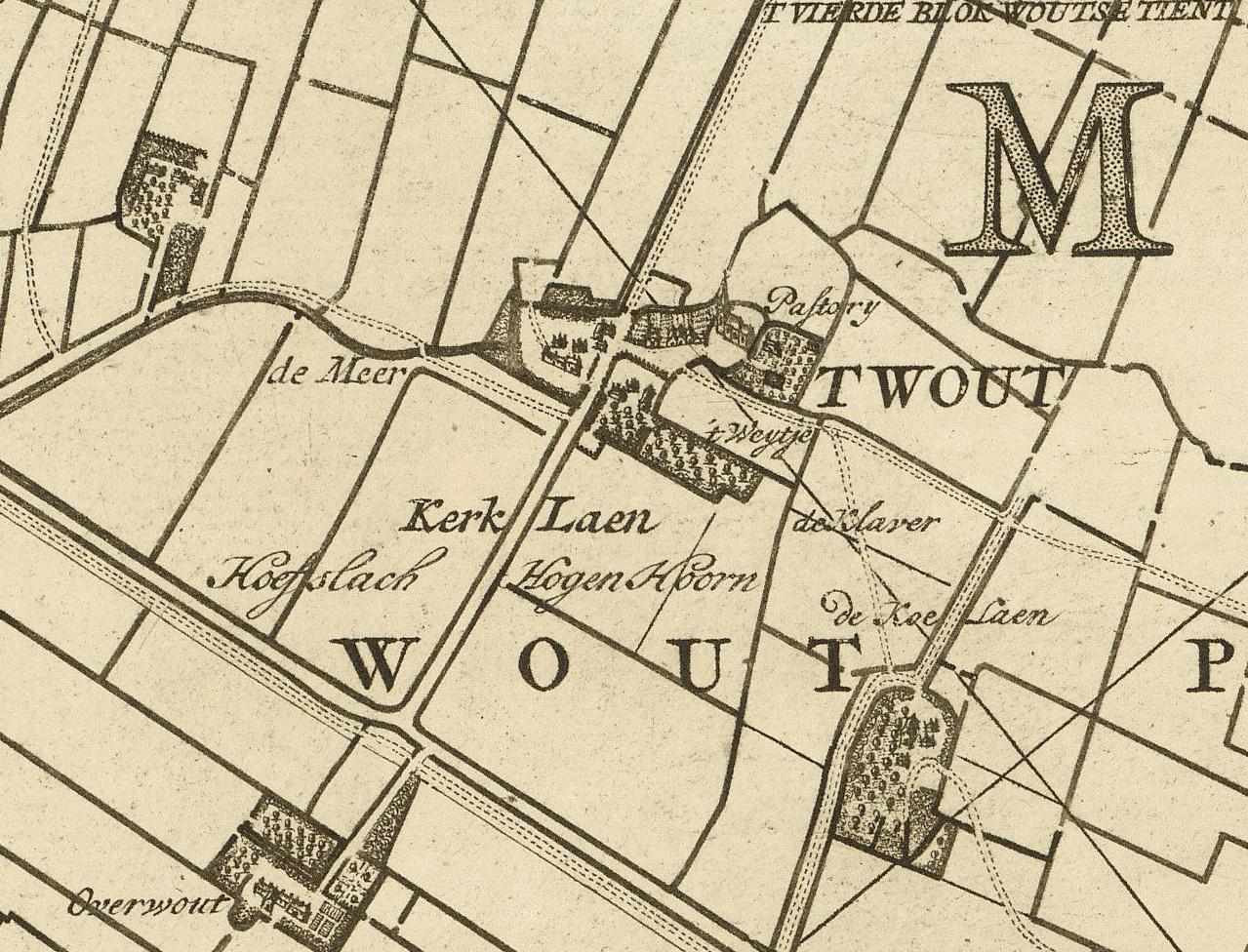 Kaart van het hoogheemraadschap van Delfland, gemeten door de landmeters Nicolaas en Joacobus Kruchius. Afgebeeld is 't Woudt, Zuid-Holland.